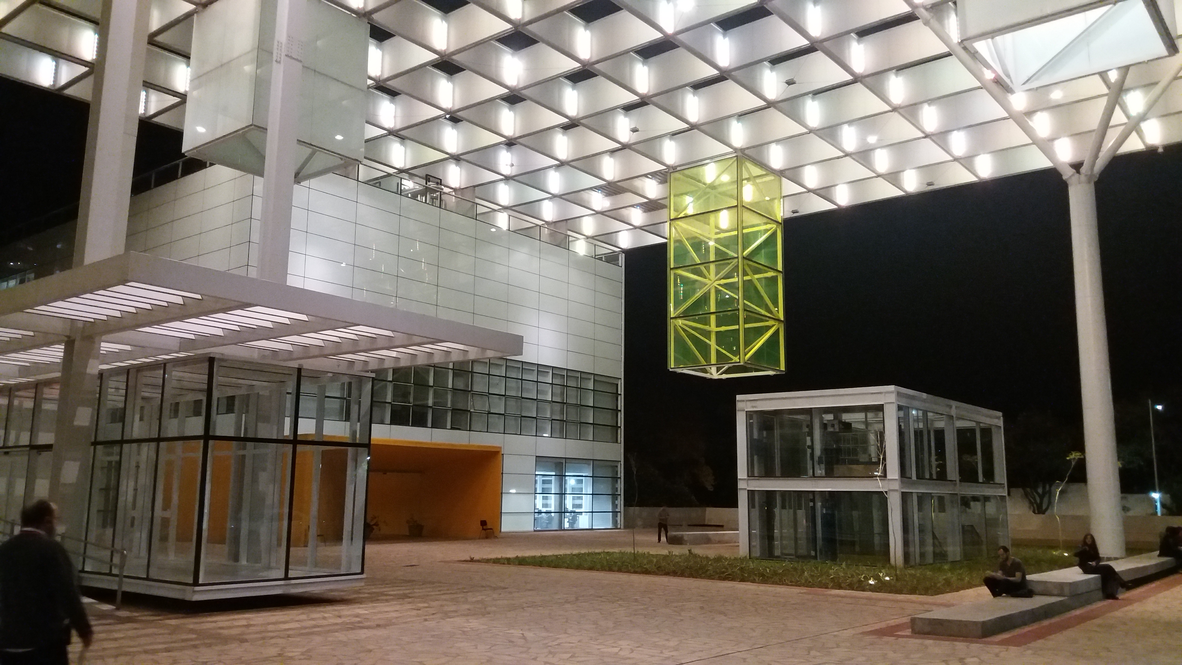 Localizada no Barro Preto, a nova sede foi inaugurada em 2017.